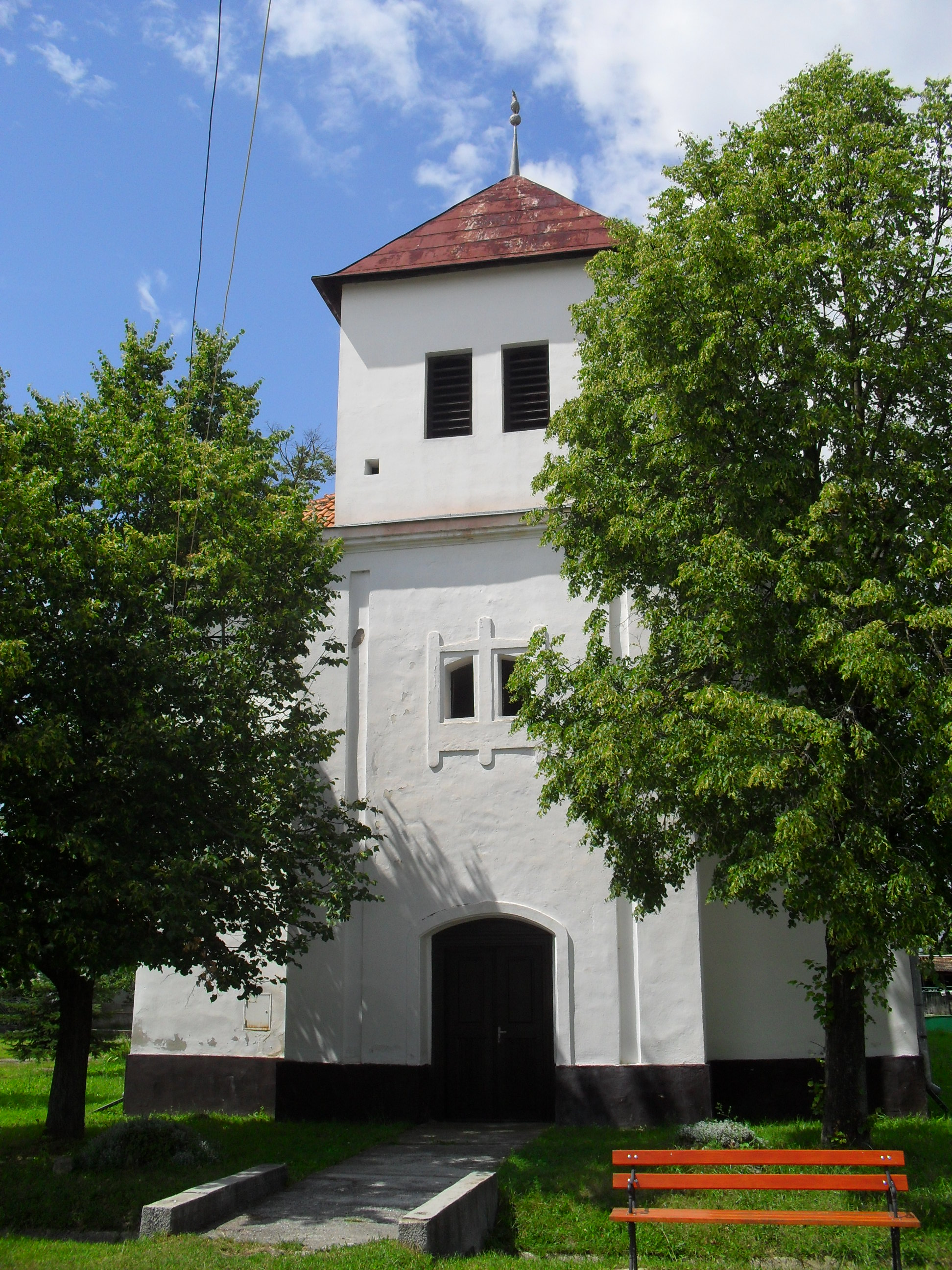 Otrokocs - református templom